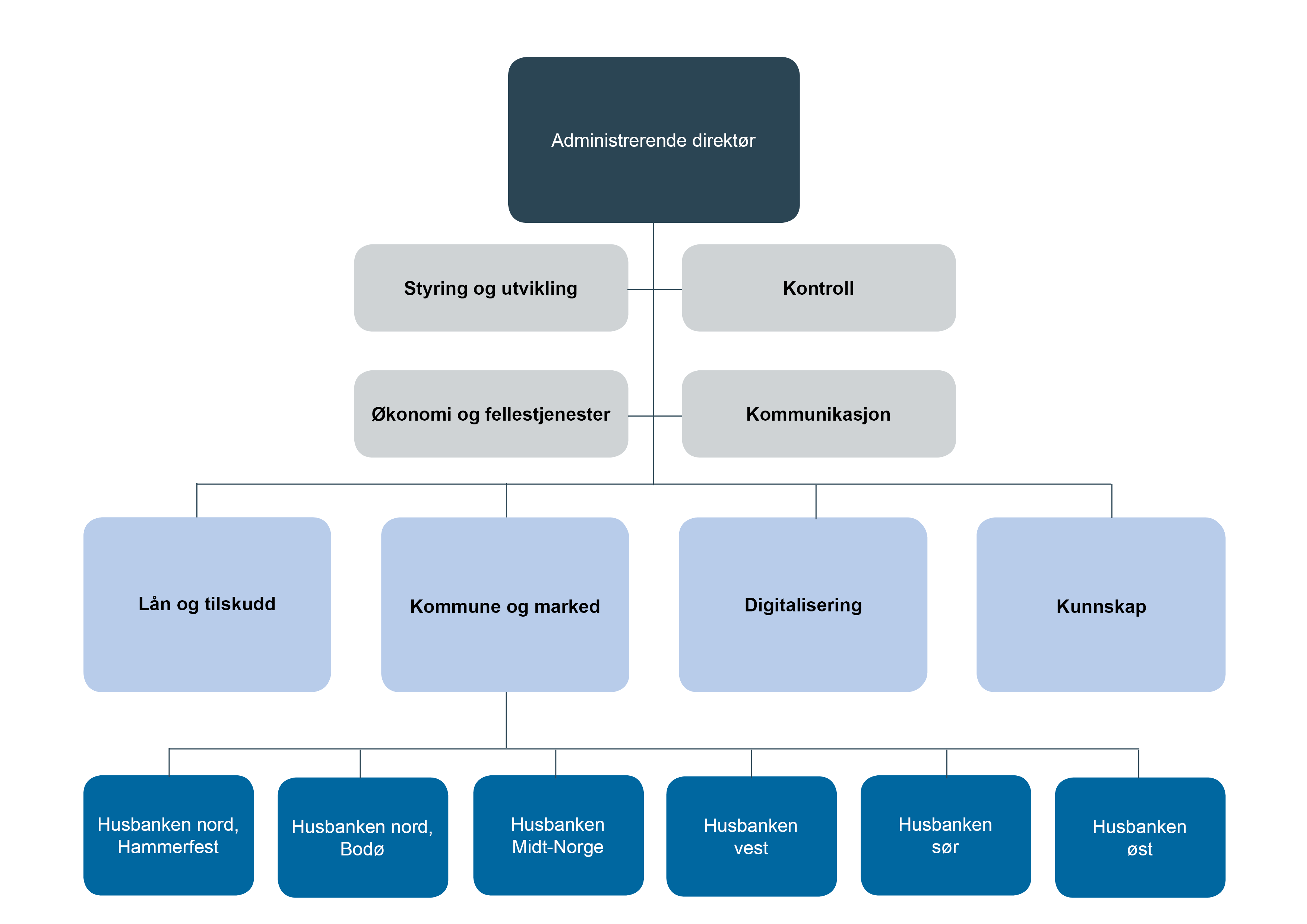 Organisasjonskart Husbanken, 2020